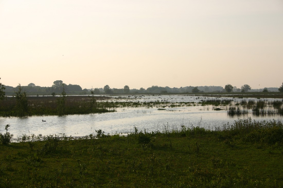 Eigen foto van de uiterwarden nabij Deventer